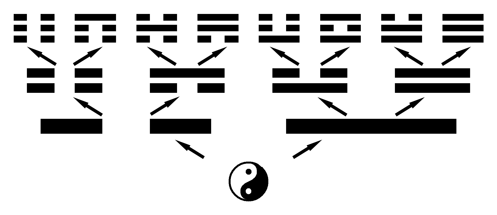 TaiJi-BaGua